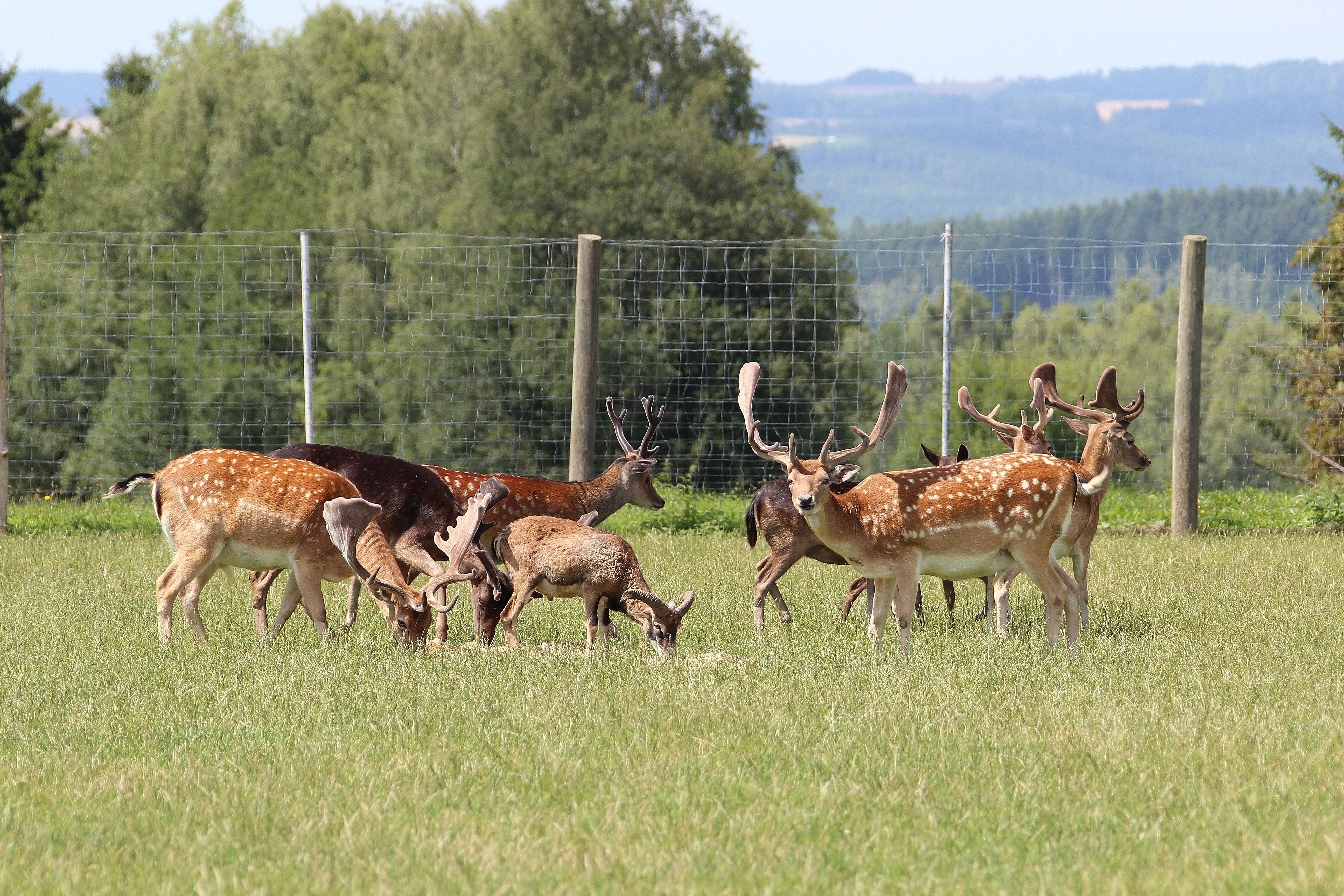 Wildgehege Plassenberg (an der Straße von Gleiritsch nach Schömersdorf): Gemeinde Gleiritsch, Landkreis Schwandorf, Oberpfalz, Bayern